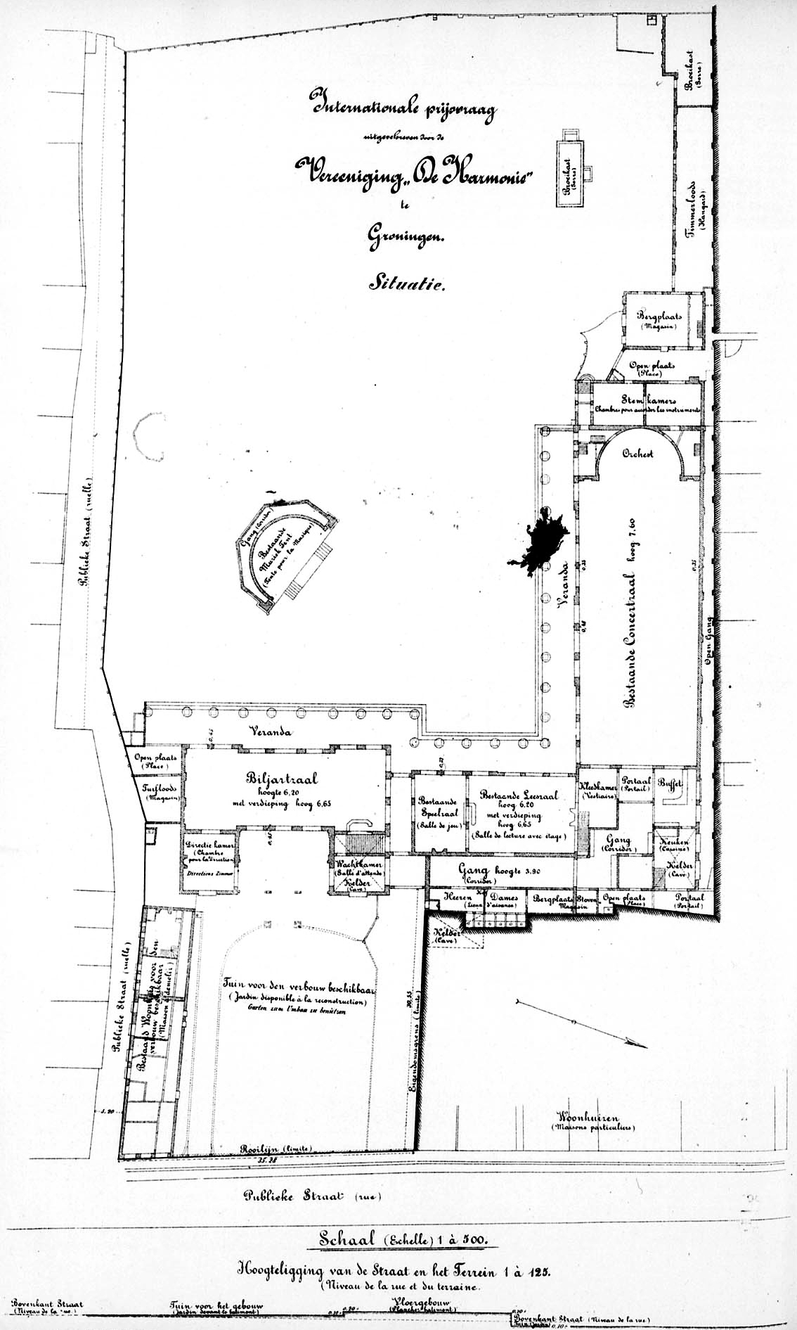 Situatieschets van De Harmonie en omgeving in de Oude Kijk in 't Jatstraat in Groningen zoals die in 1884 was, gepubliceerd in het architectuurtijdschrift De Opmerker ter gelegenheid van een prijsvraag voor de voorgenomen verbouwing van het pand.